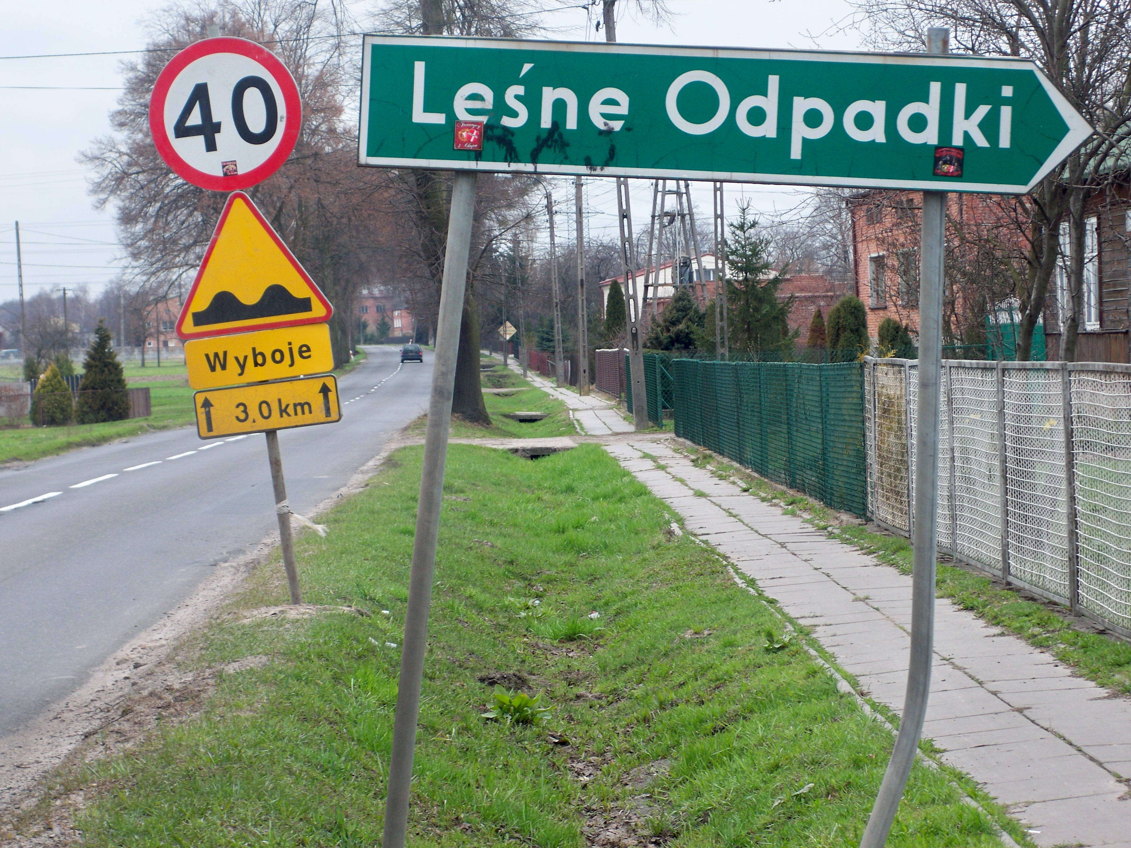 Leśne Odpadki Gmina Brójce